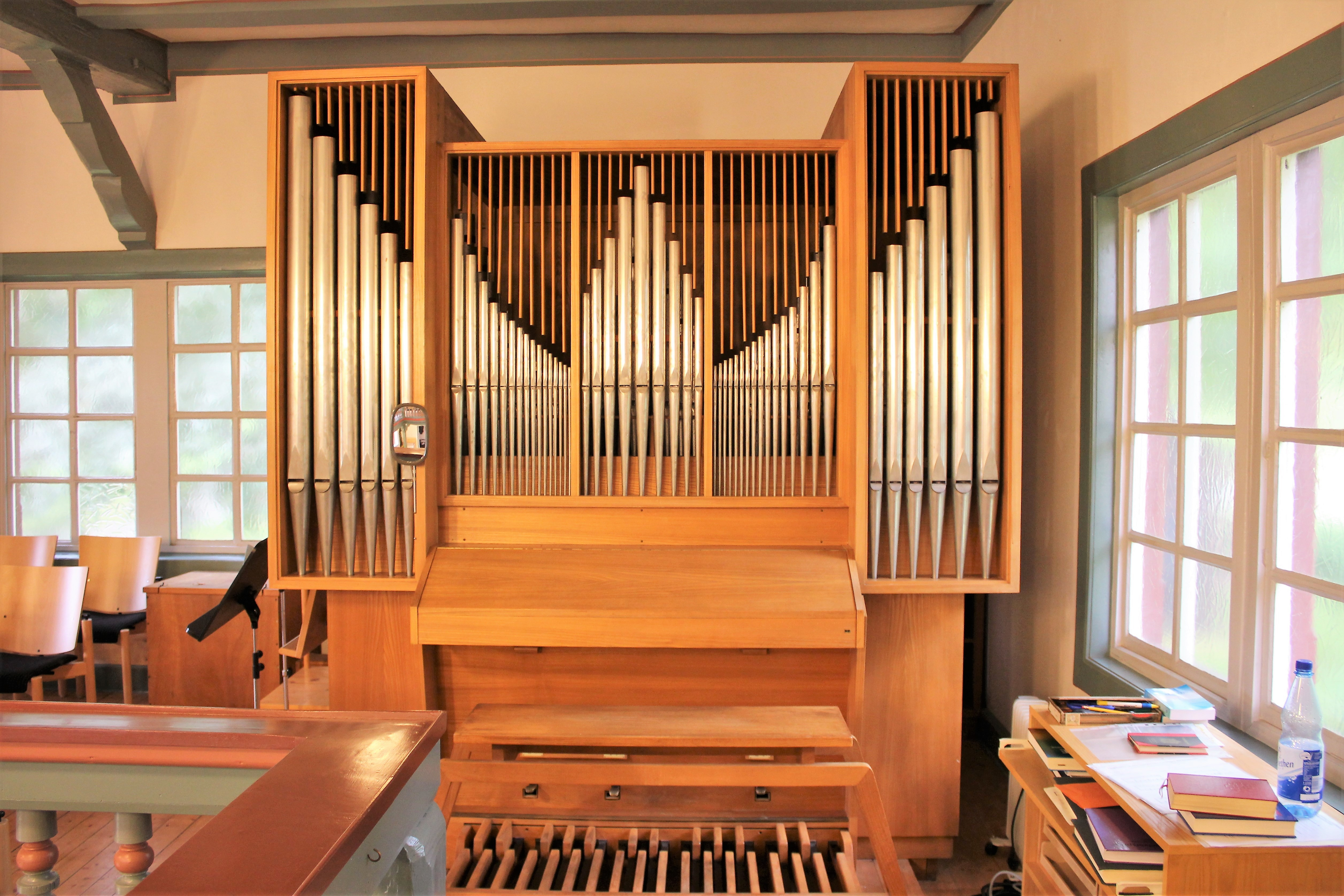 Kapelle Alter Friedhof, Gießen, Hessen, Deutschland